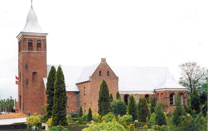 Hornslet Kirke